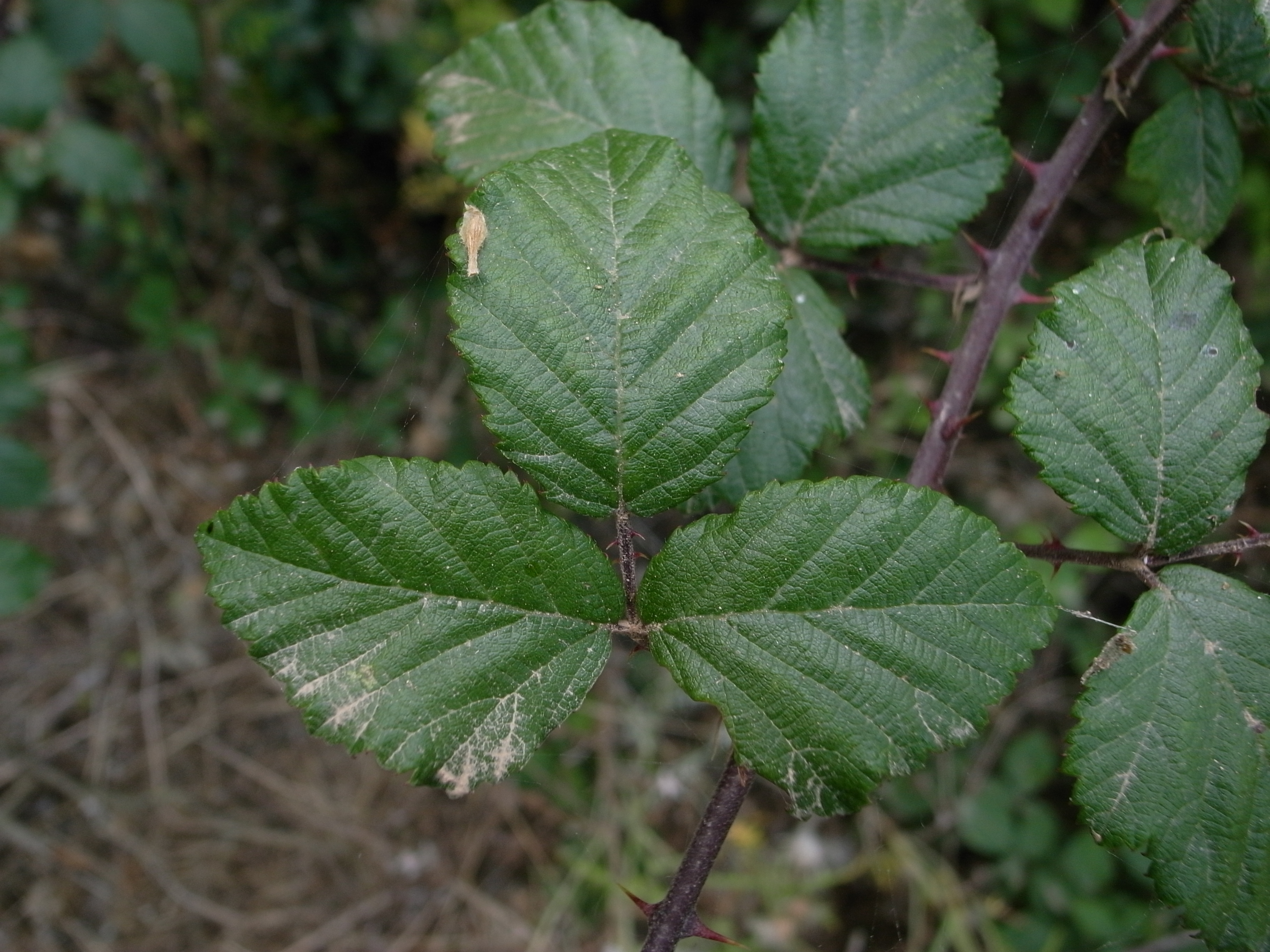 Rubus ulmifolius, Buskett Gardens, Malta